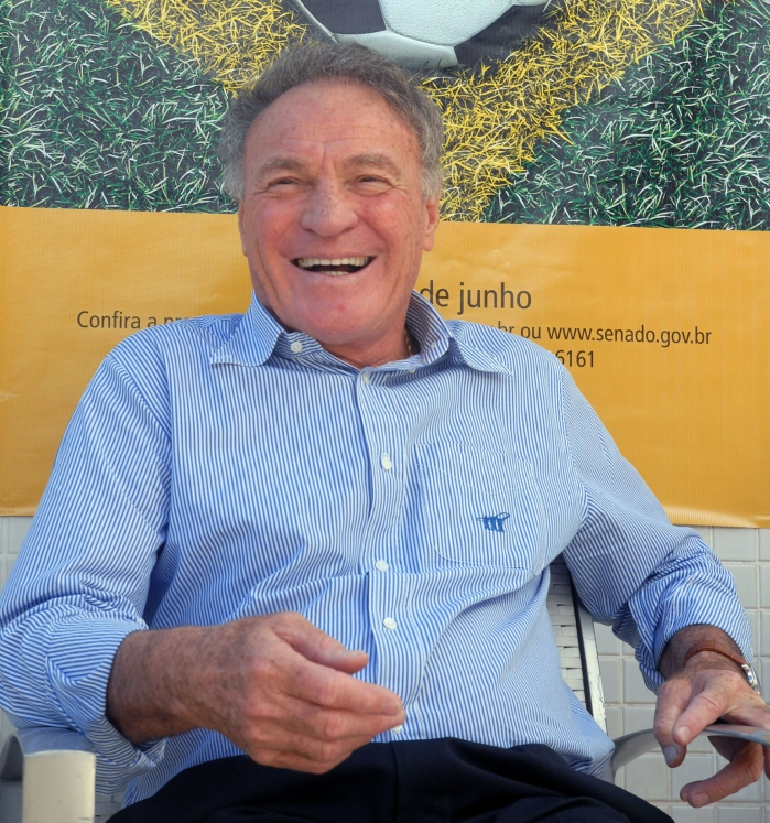 José Altafini